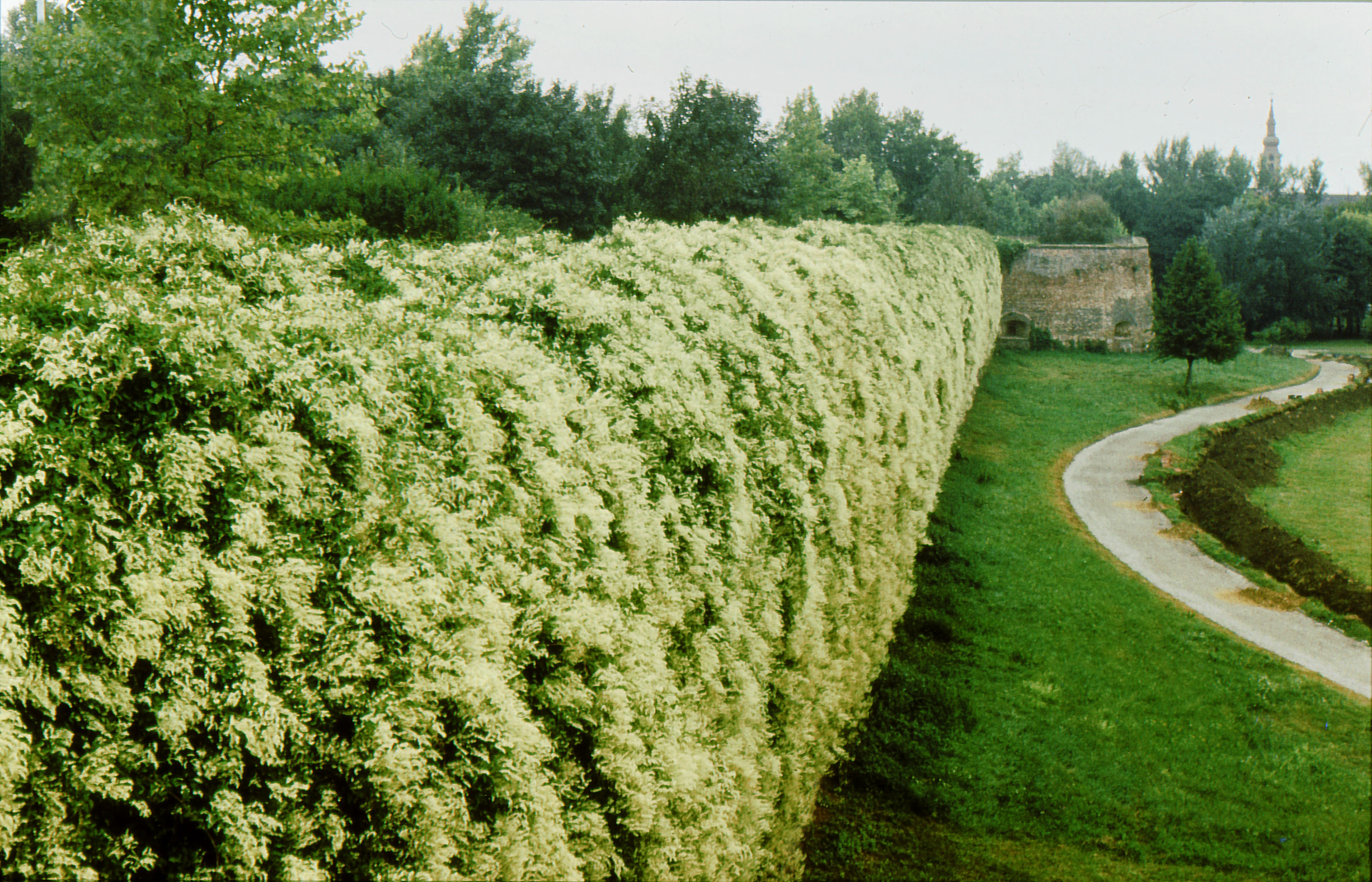 Szigetvár, a vár keleti fala